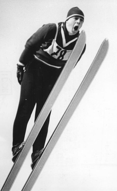 Zentralbild Kohls 26.2.1963 XIV. Deutsche Meisterschaften in den Nordischen Disziplinen Die XIV. Deutschen Meisterschaften in den Nordischen Disziplinen werden vom 20. bis 24. Februar 1963 in Klingenthal-Erzgebirge ausgetragen. UBz: Der erste Durchgang im Spezialsprunglauf fand am 23.2.1963 auf der Großen Aschbergschanze in Klingenthal statt. Der deutsche Jugendmeister Karwofsky, der sich gegen die "Großen" kräftig schlug, kam mit Sprüngen von 84,5 und 86 m auf den 5. Platz.